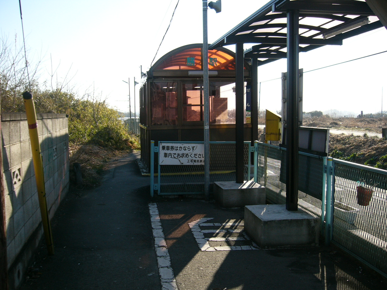 Zen Station